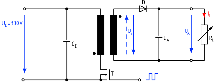 Prinzipschaltung vun engem Sperrwandler